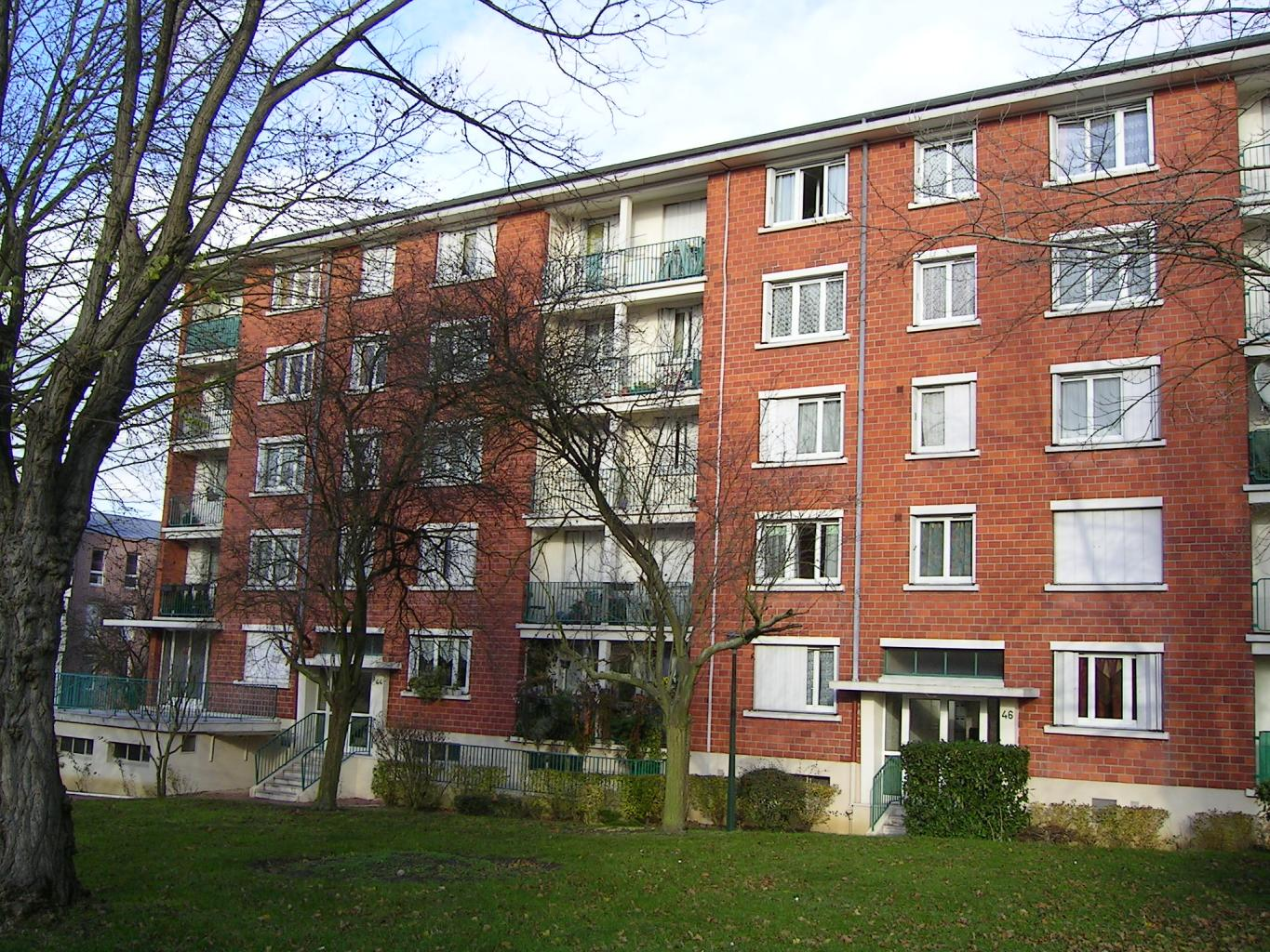 Livry-Gargan (Seine-Saint-Denis) - Immeuble d'habitation Rue du Château Décembre 2006 Photo personnelle (own work) de Marianna